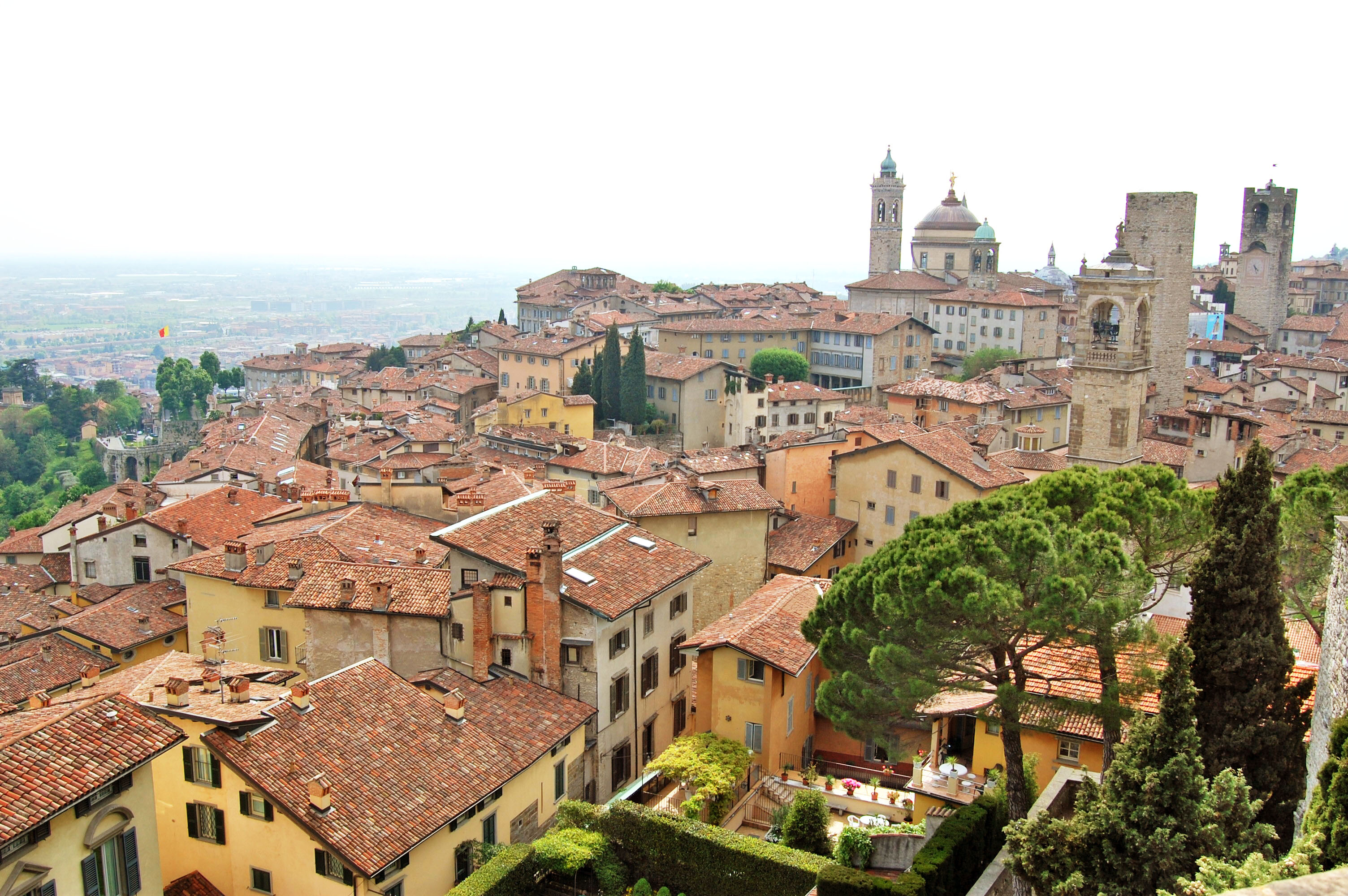 Veduta della città alta dalla rocca